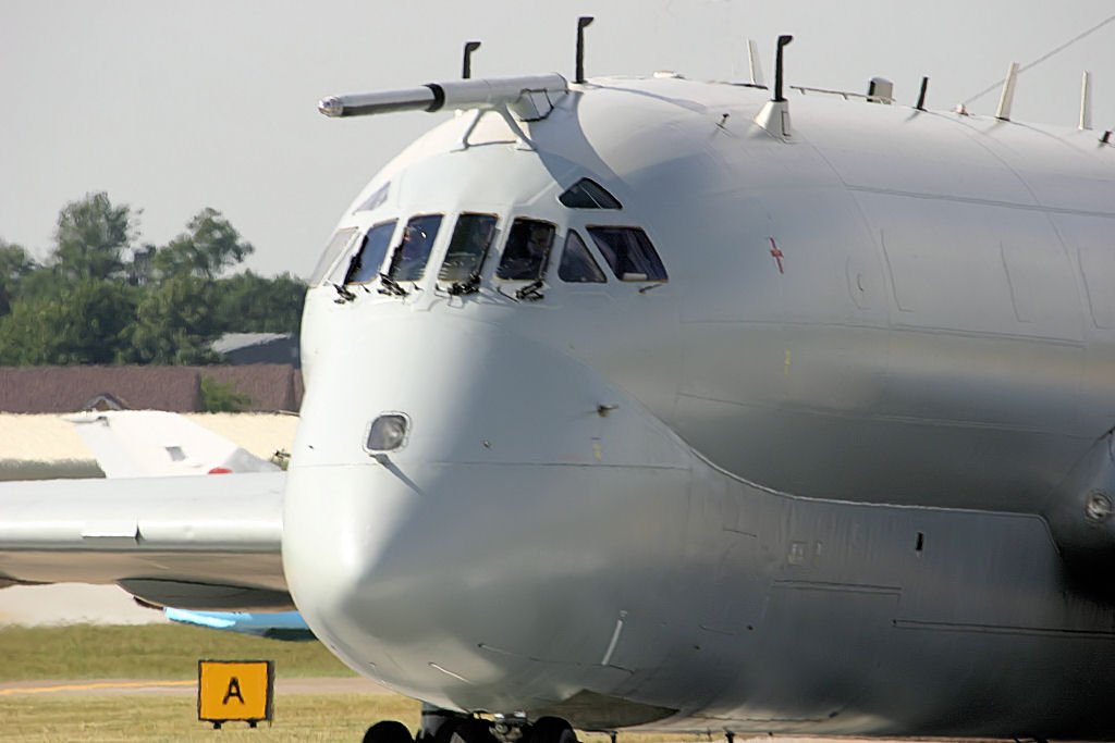 Nimrod - RIAT 2005